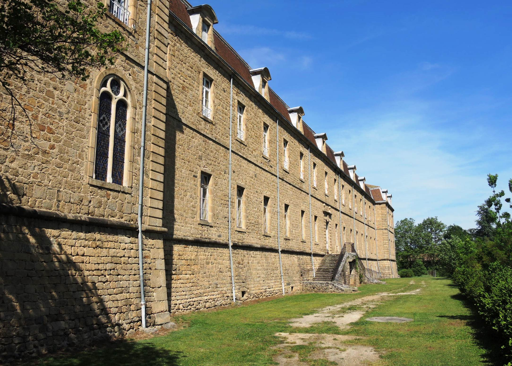 Colombier-le-Cardinal détail